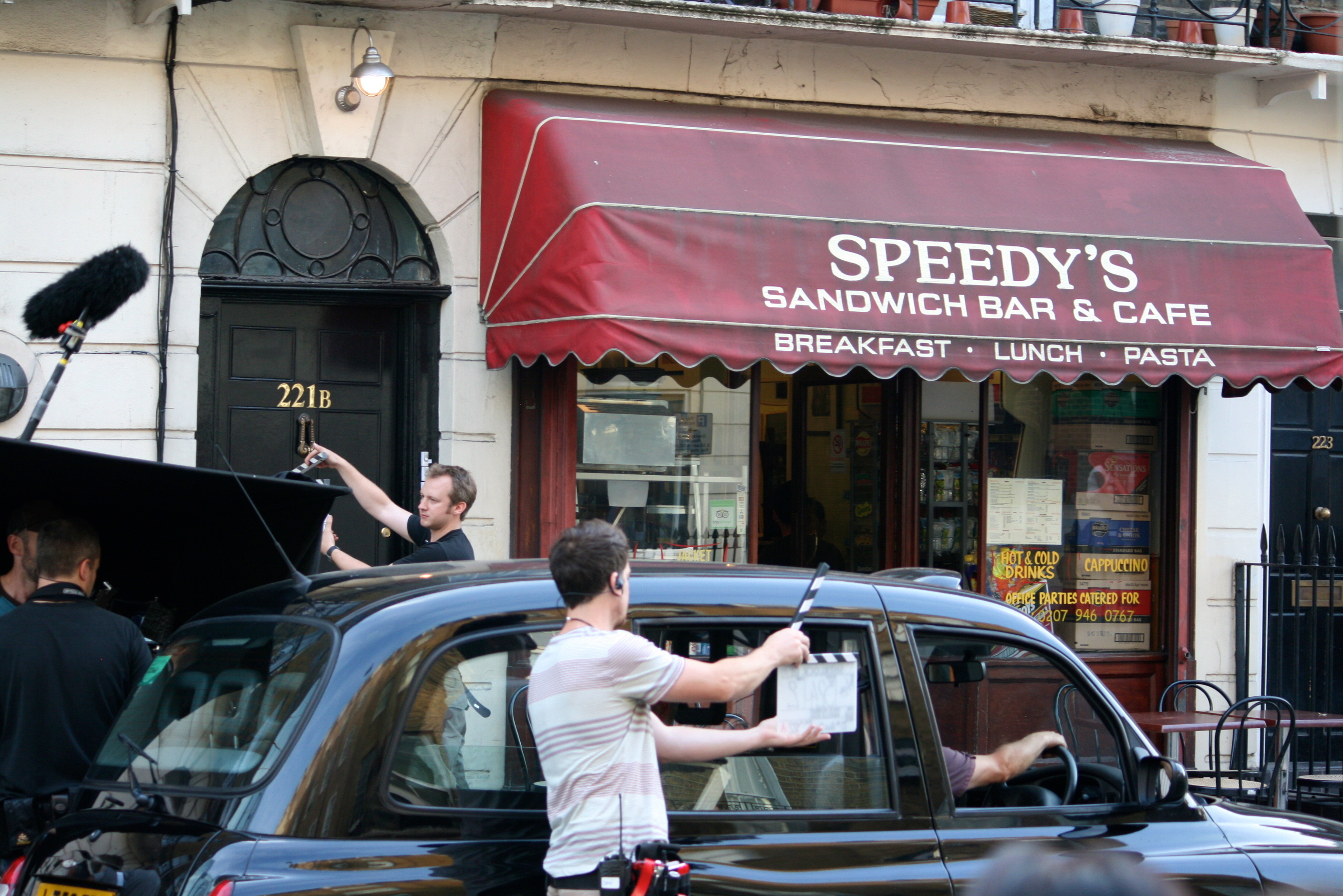 opname van "Sherlock" (bij 221B Baker street)